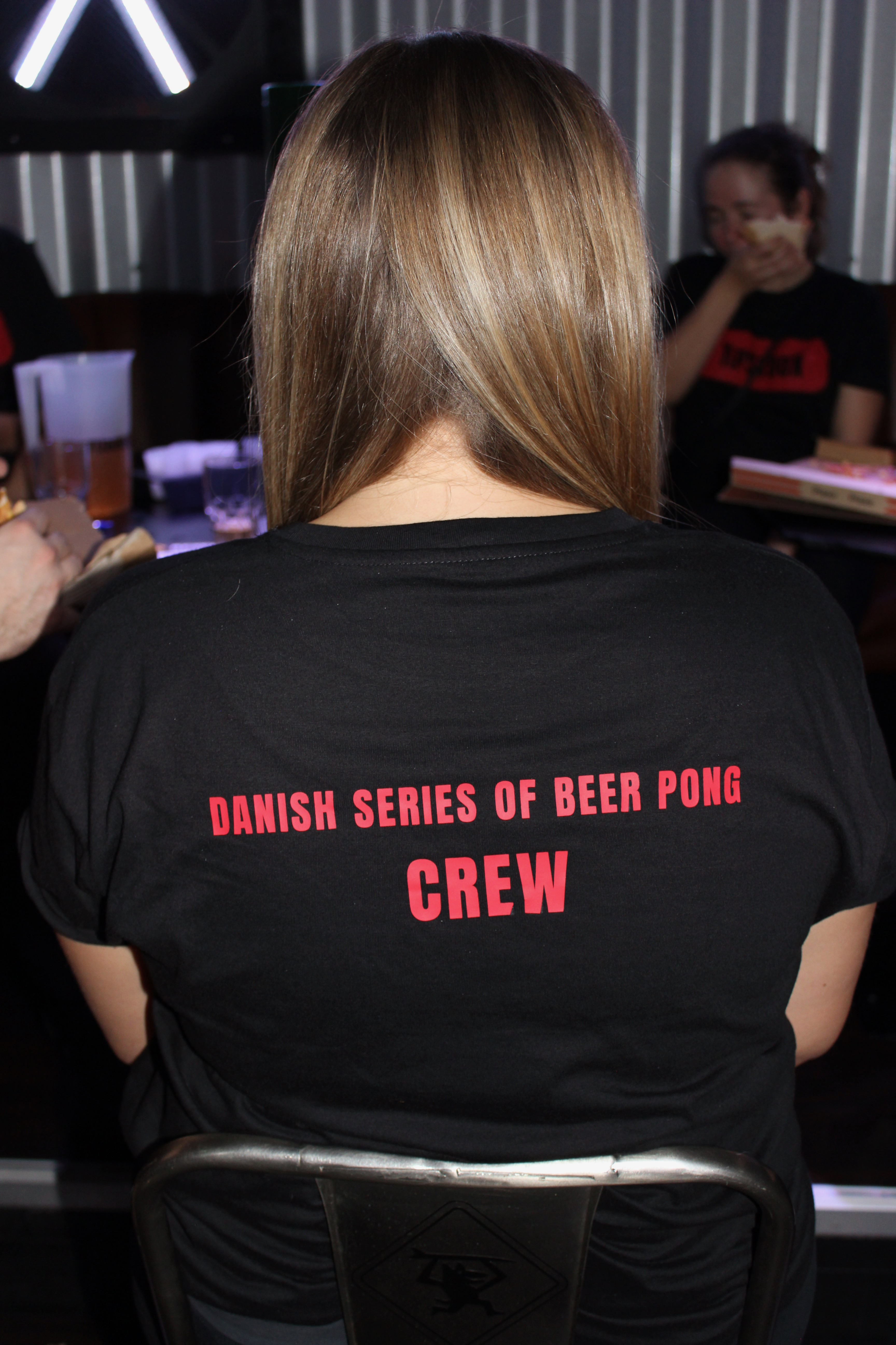 Dette er en af de frivilliges trøjer til årets finalevent 2019 for DSOBP.